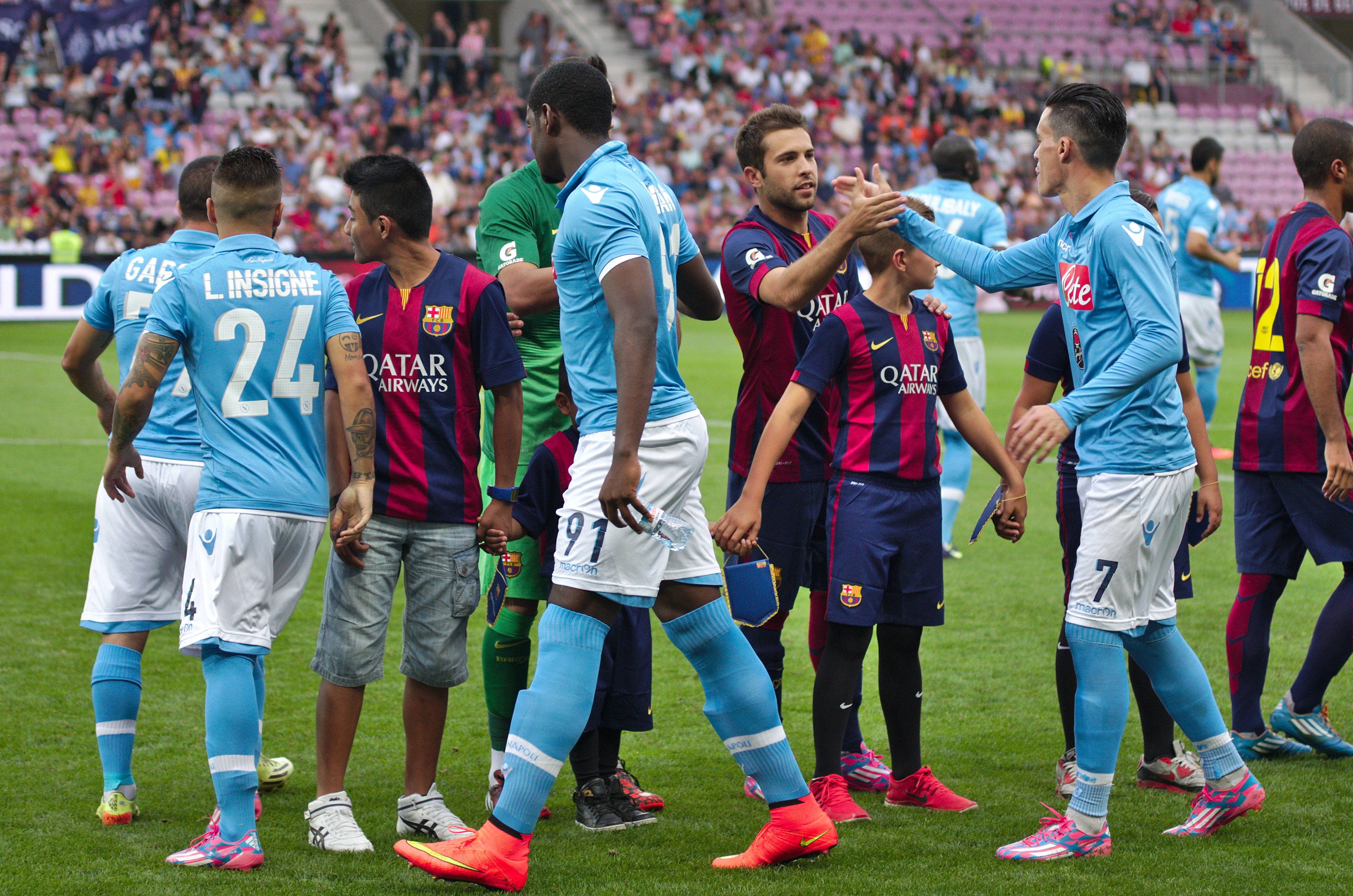 Barça - Napoli - 20140806 - Salut des équipes